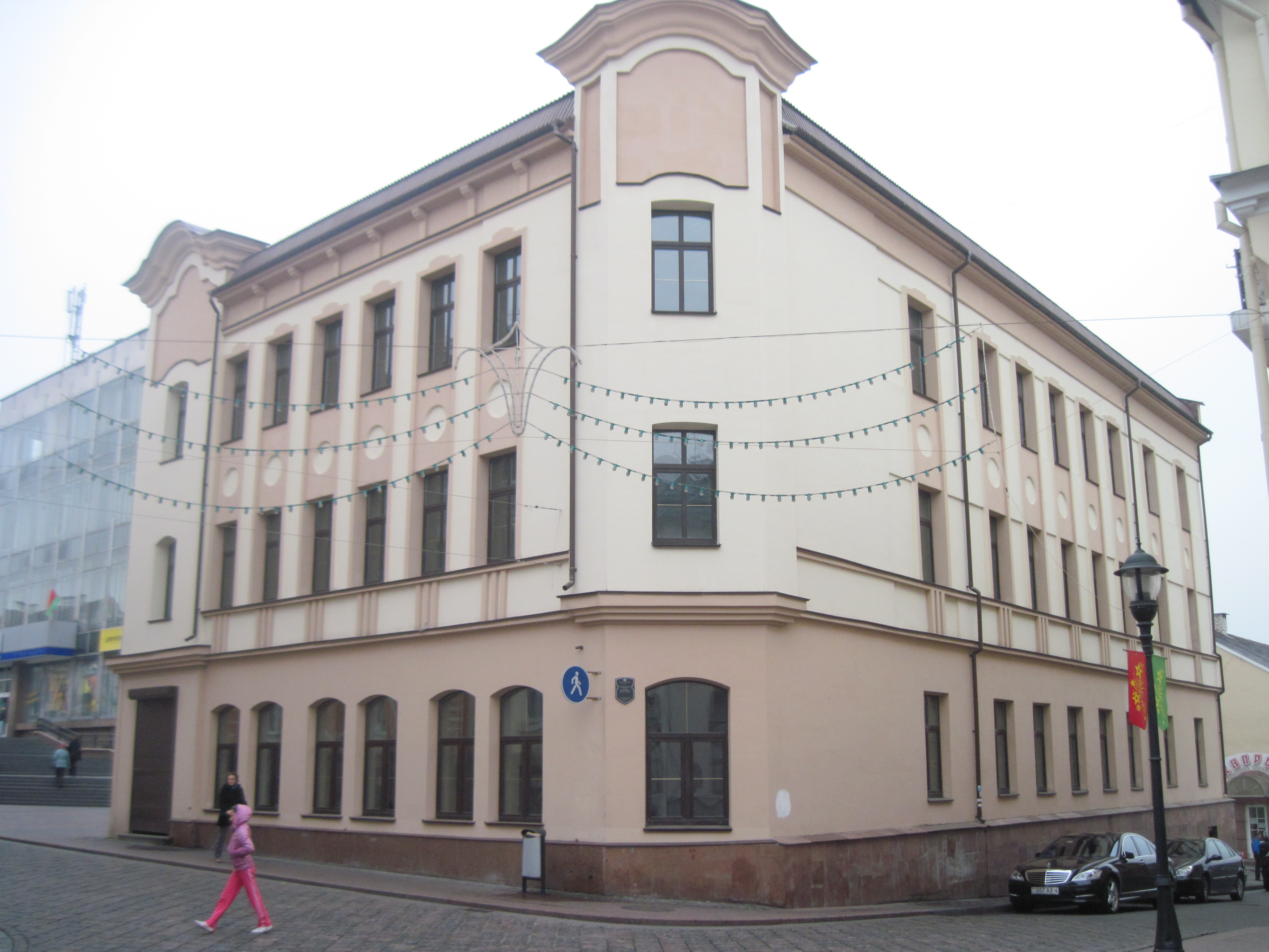 Беларуская (тарашкевіца): Здымак будынка ў Гродне, вул. Савецкая, 20